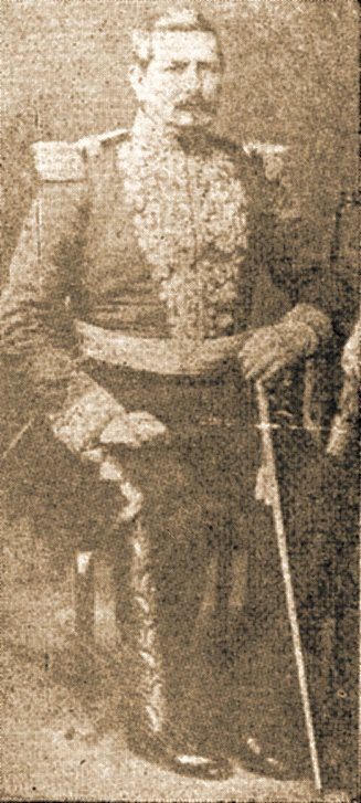 Gerardo Barrios. fue segundo designado en la residencia de Santín. Fotografia de la epoca